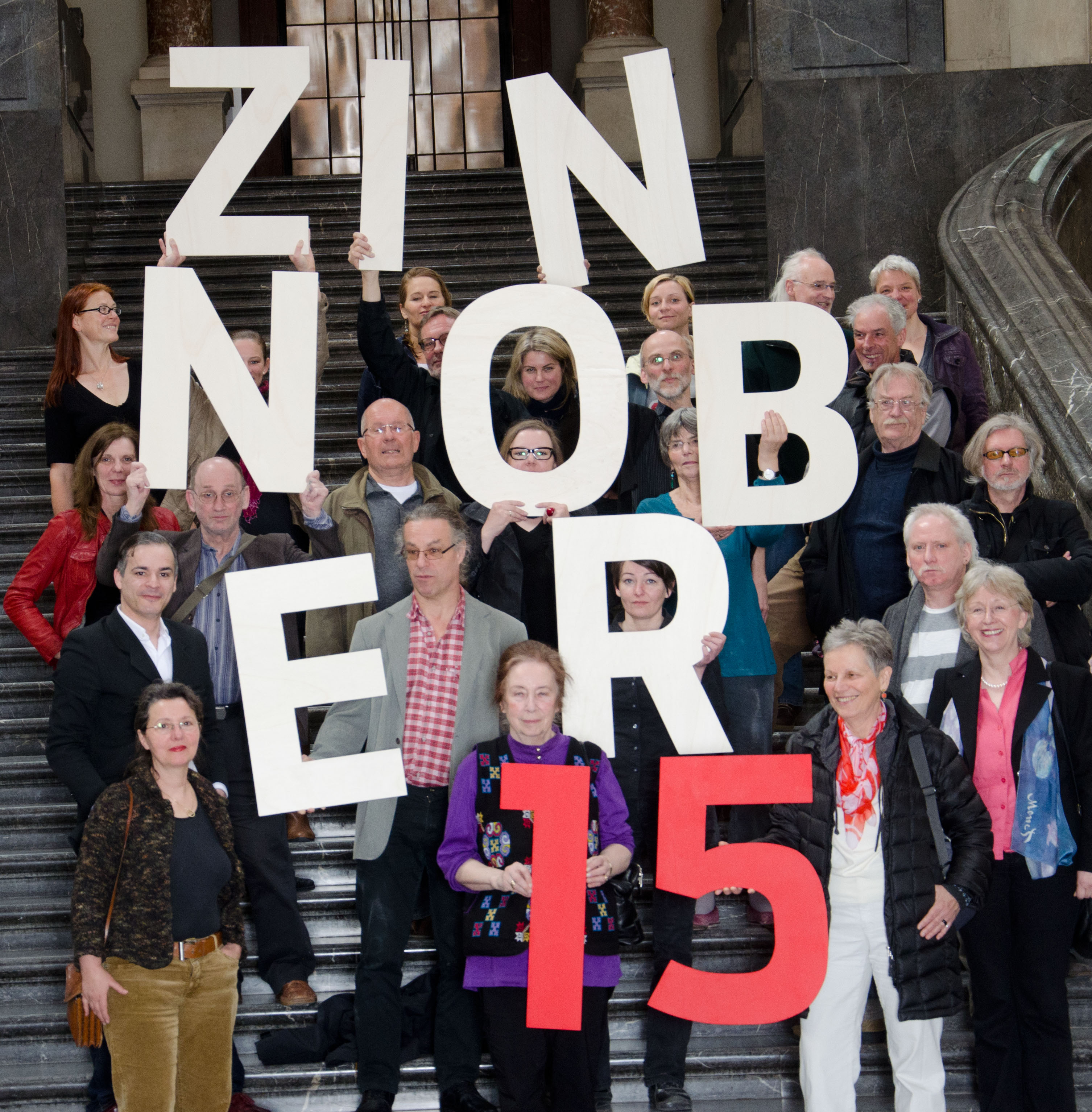 Pressefoto zum 15. Zinnober-Kunstvolkslauf am 1. und 2. September 2012, aufgenommen von Jens Felisch auf dem Treppenaufgang im Neuen Rathaus der niedersächsischen Landeshauptstadt Hannover ...